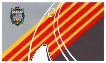 Bandera del Municipio Iribarren